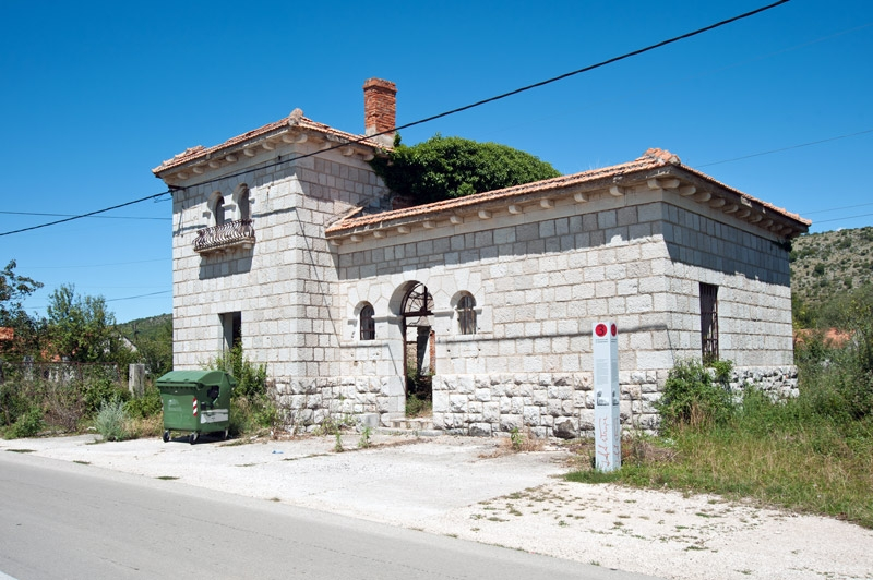 Ivan Meštrović Antimalarična stanica u Otavicama